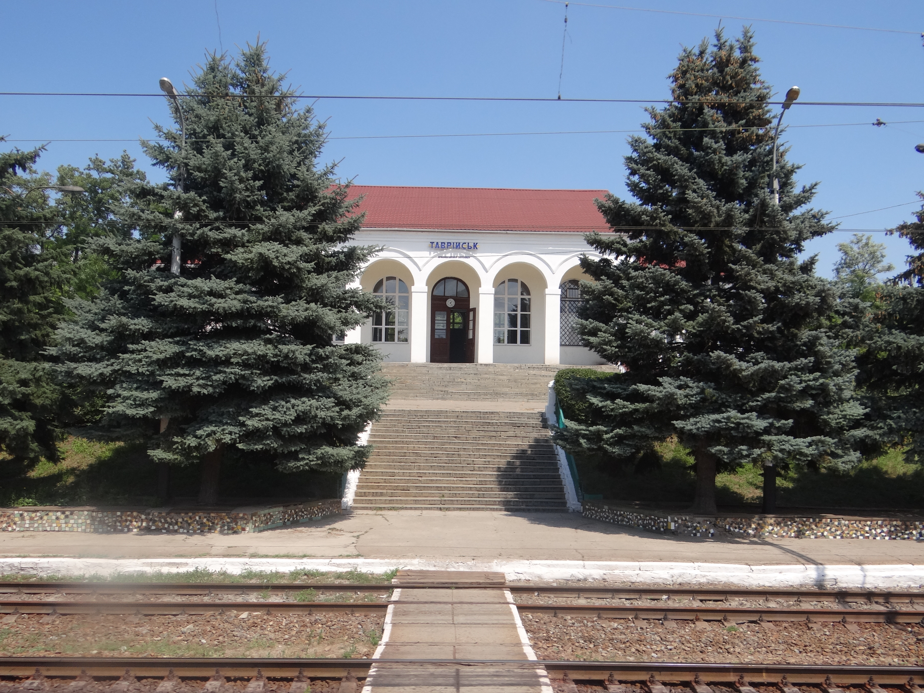 Таврійськ